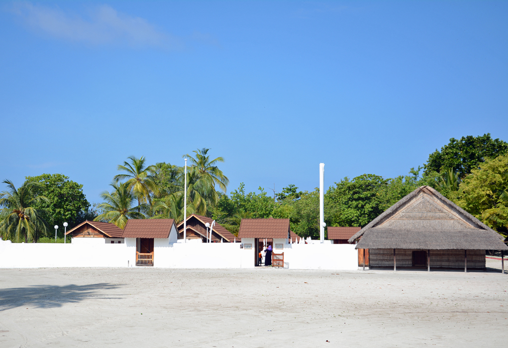 Utheemu Island, Ganduvaru resicende